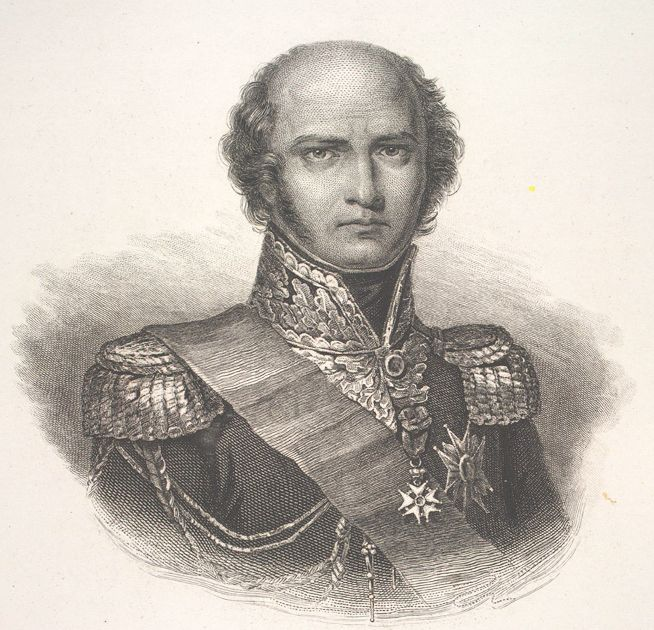 Davout, Louis Nicolas, duc d'Auerstaedt, prince d'Eckmühl, (1770-1823) maréchal